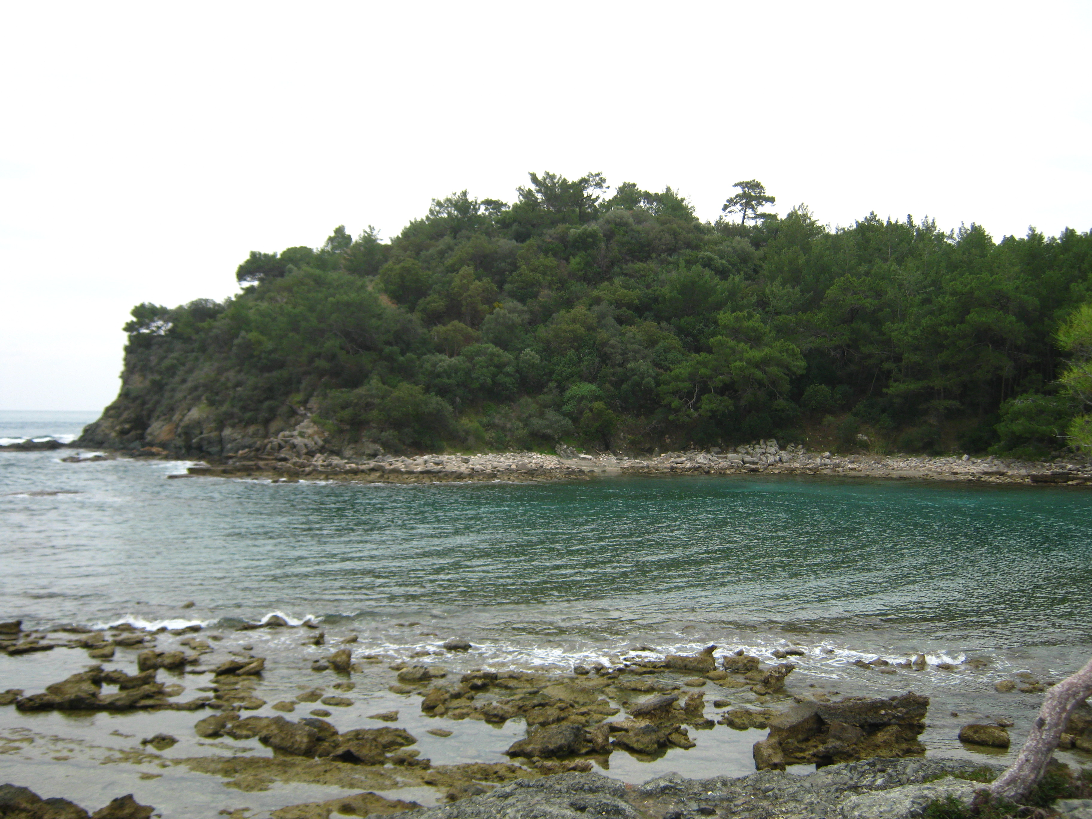 Фаселіс. Загальний вигляд на пагорб акрополя та "Міську гавань"